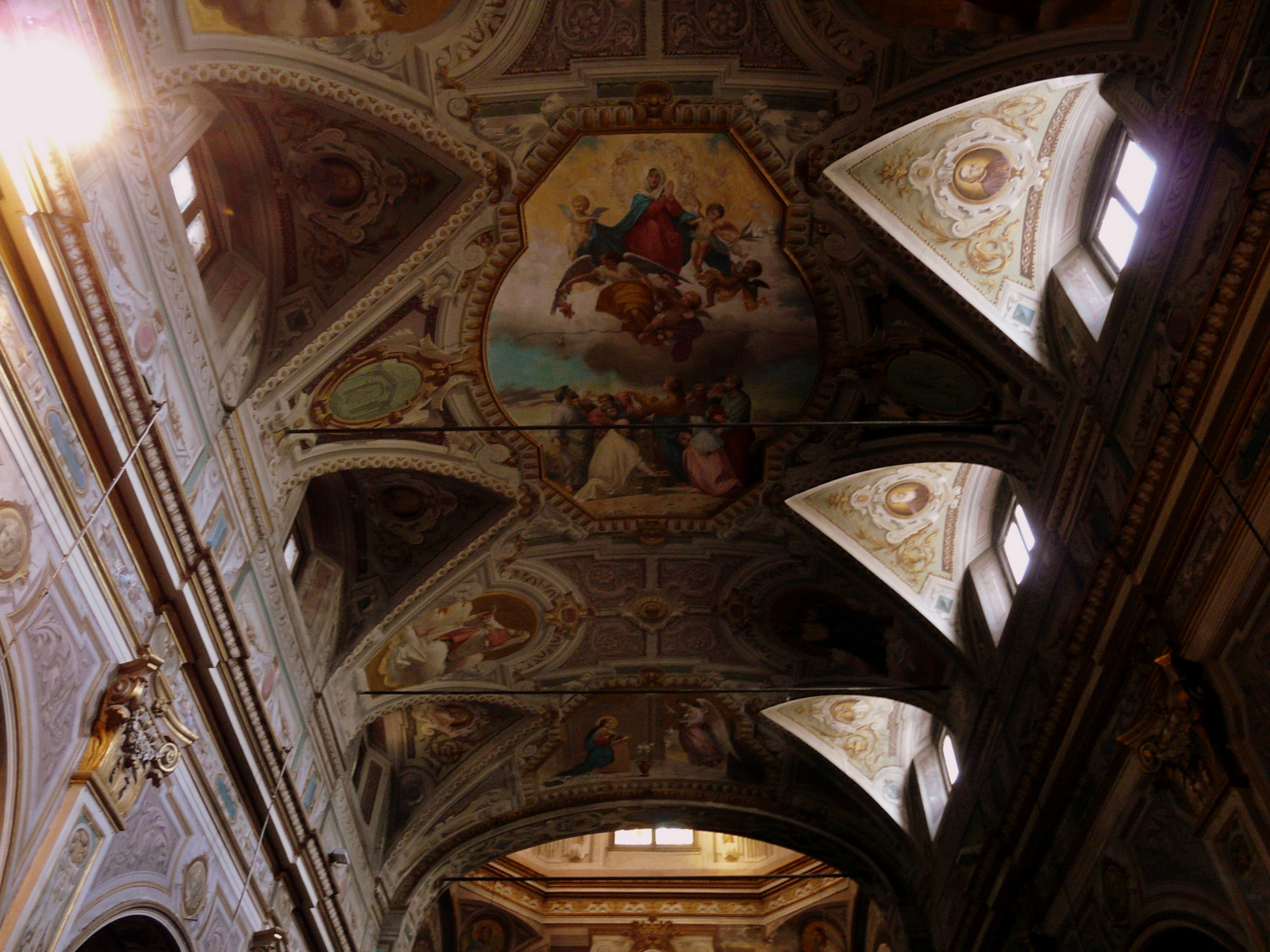 Affreschi della navata centrale, chiesa di Nostra Signora Assunta, Rossiglione, Liguria, Italia